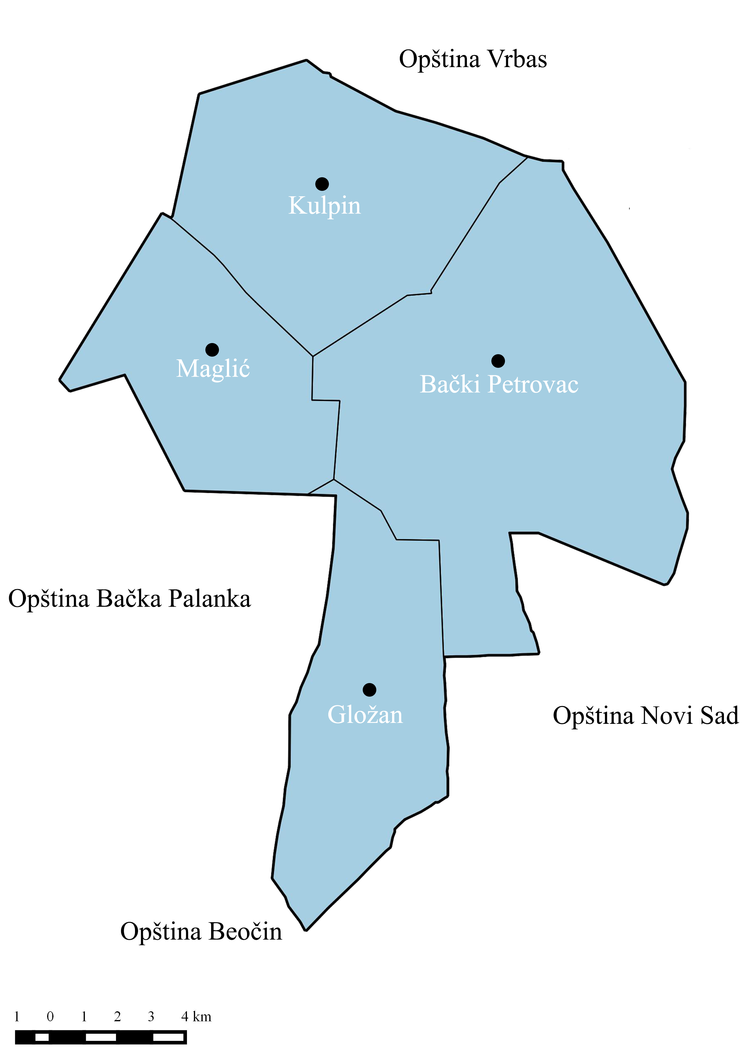 Vymedzenie územia obce